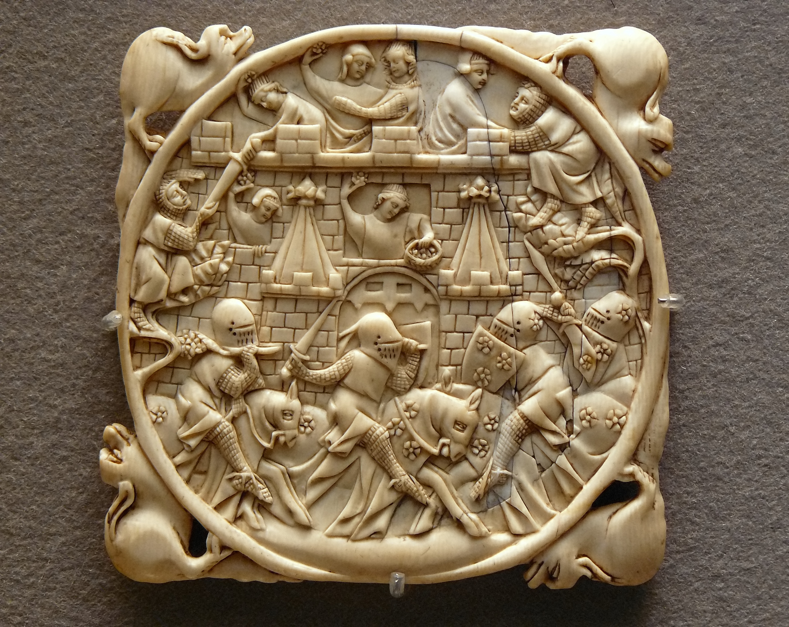 Valve de miroir en ivoire "Siège du château d'amour" - Deuxième quart du XIVème siècle - Musée du Louvre